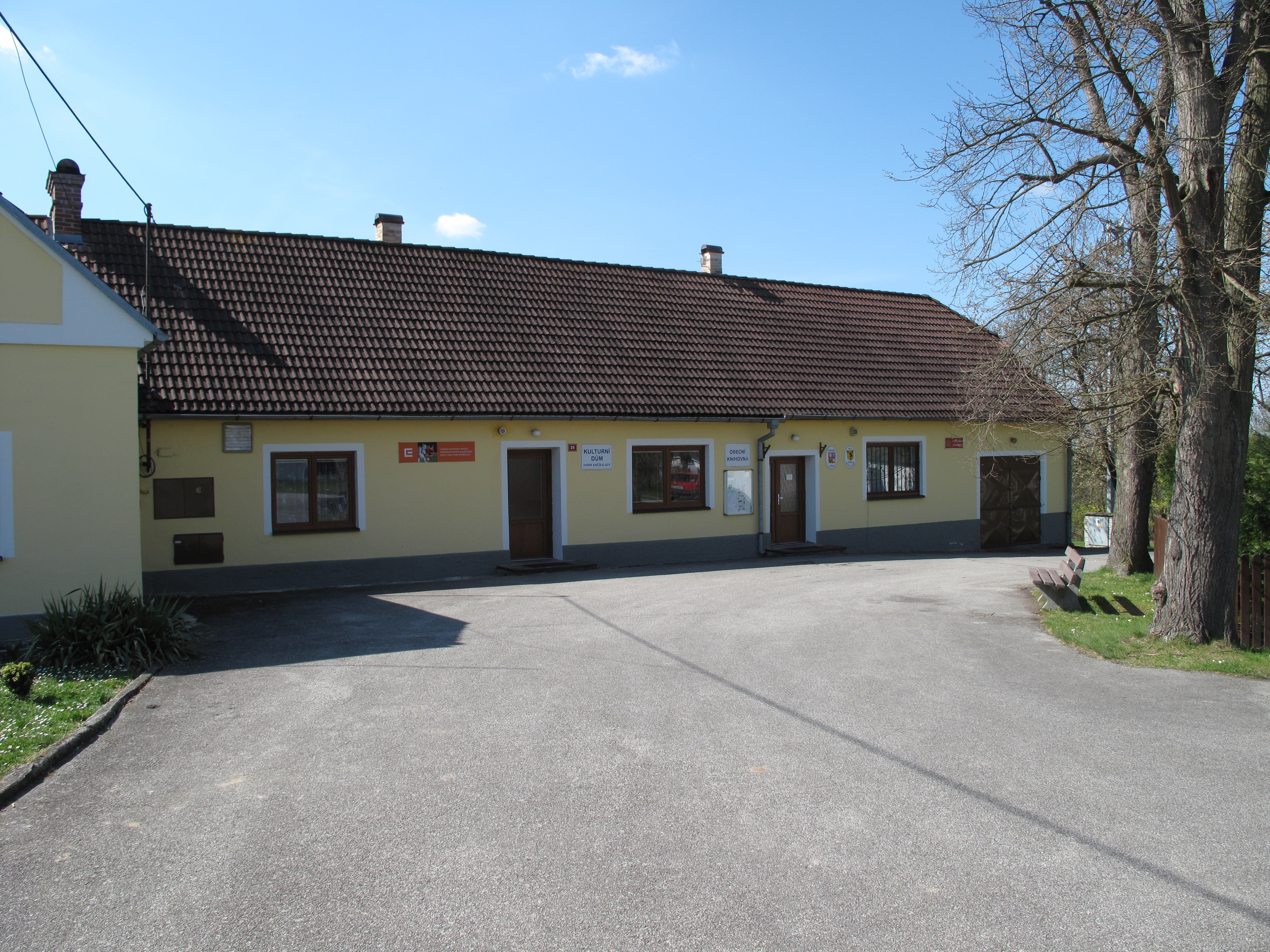 Obecní úřad v Horních Kněžekladech. Okres České Budějovice, Česká republika.